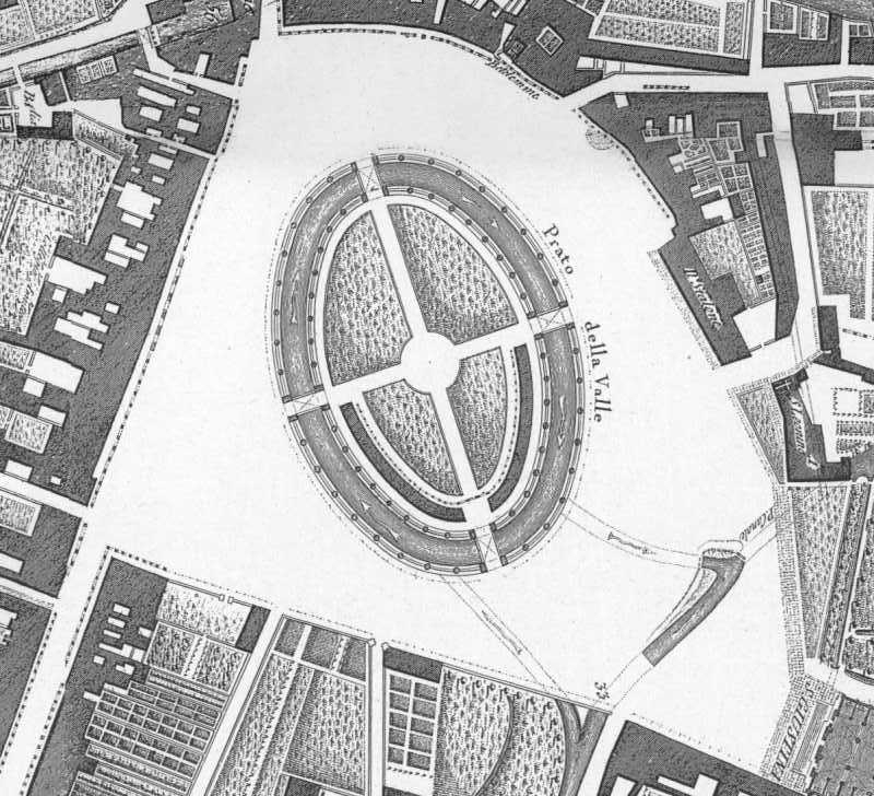 Particolare dell'area di Prato della Valle dalla Pianta disegnata da Giovanni Valle